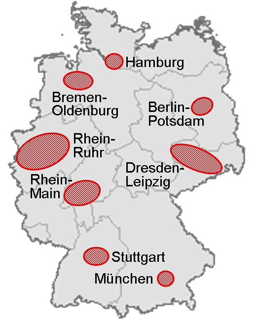 Karte der acht Modellregionen Elektromobilität in Deutschland